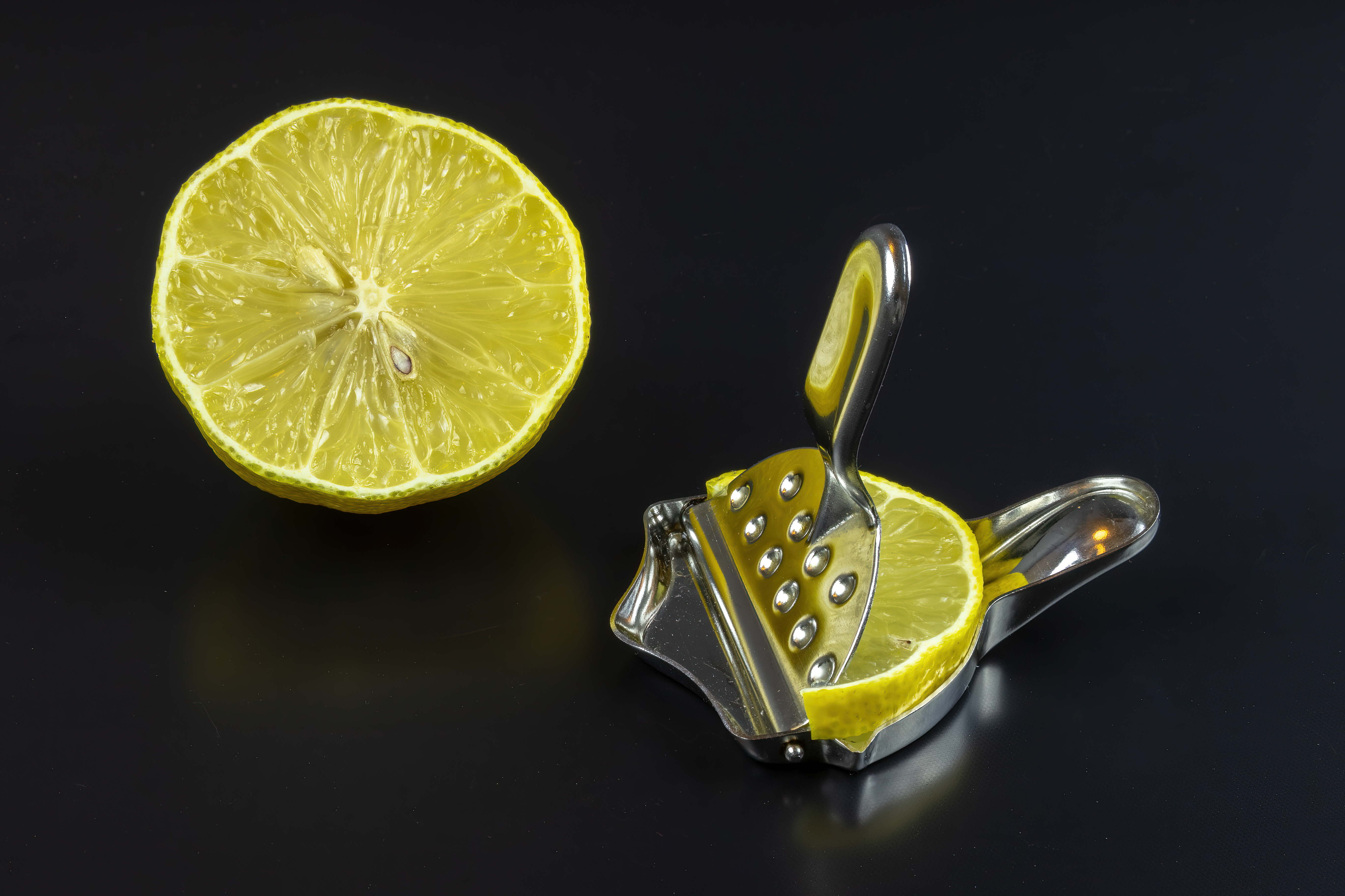 "citro" Zitronenschnitzelpresse des Herstellers Ritter